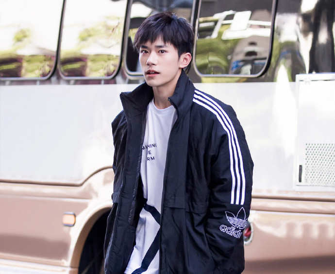 易烊千玺Adidas